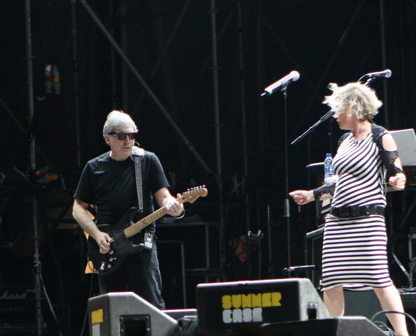 Blondie en el Summercase 08 de Barcelona